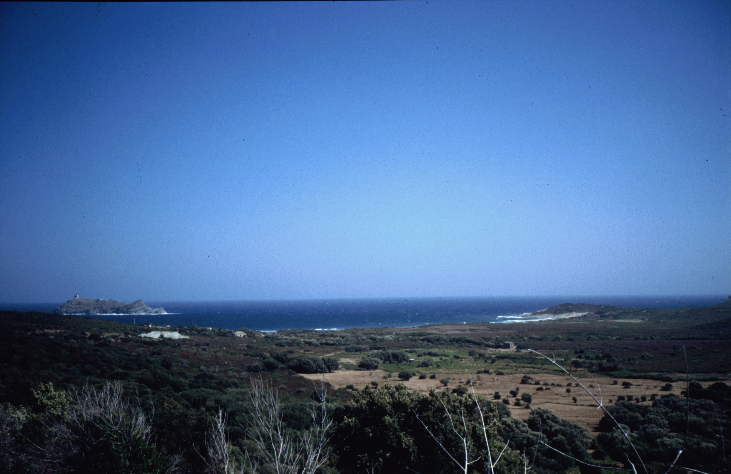 Bild-Beschreibung Beschreibung: Cap Corse - Blick nach Norden Quelle: Selbstfotografiert Fotograf oder Zeichner: Birgit Lachner Andere Versionen: - Lizenzstatus: GNU FDL